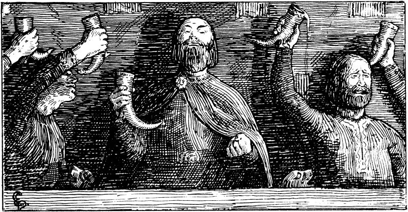 Halfdan Egedius: Illustration for Olav Trygvasons saga. Snorre 1899-edition. «Sigvalde Jarl gjør Løfte ved Mindebægret.» nb: «Sigvalde jarl gjør løfte ved minnedrikken.» nn: «Sigvalde jarl gjer lovnad ved minneskåla.»